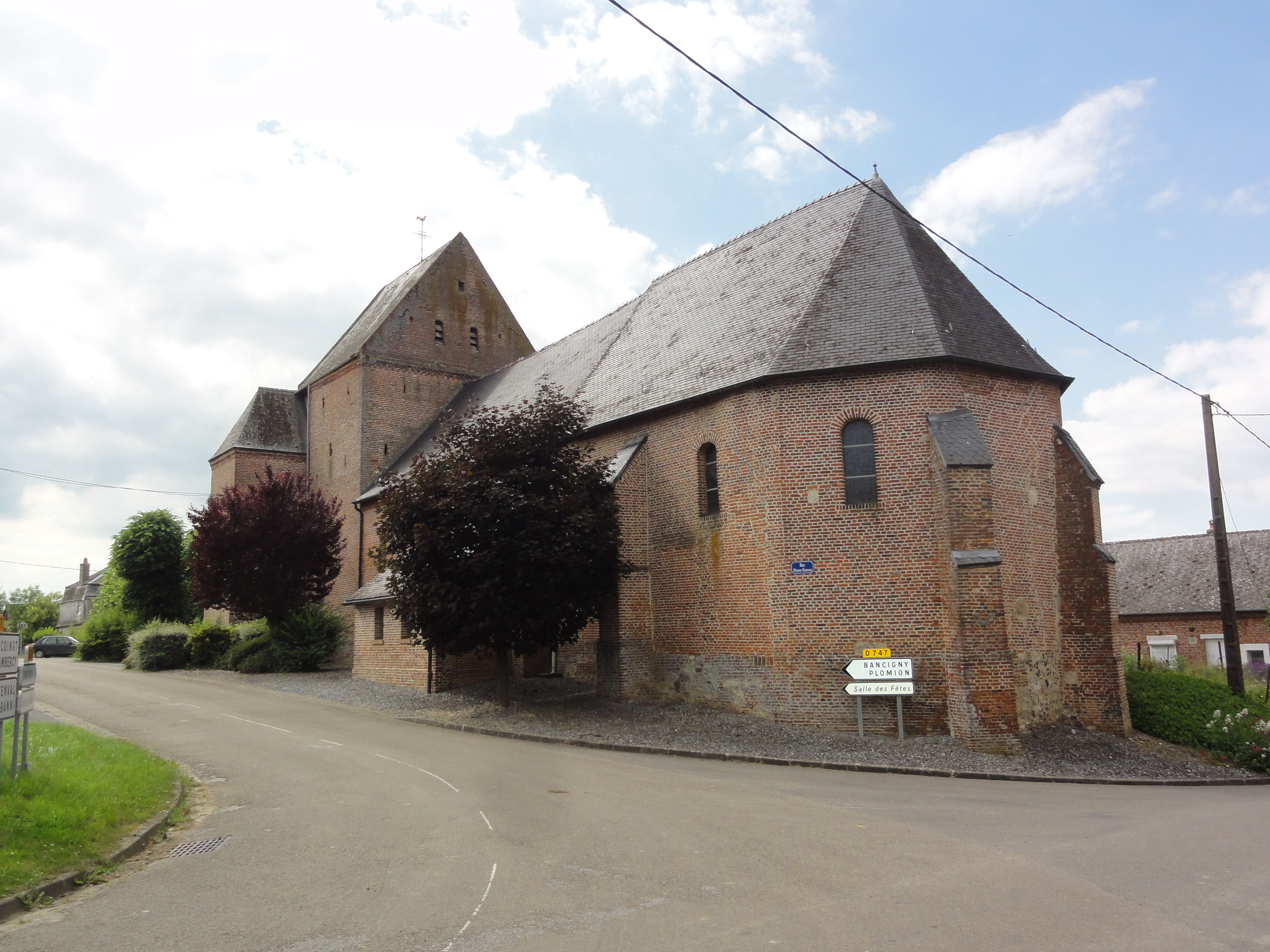 Jeantes (Aisne) église